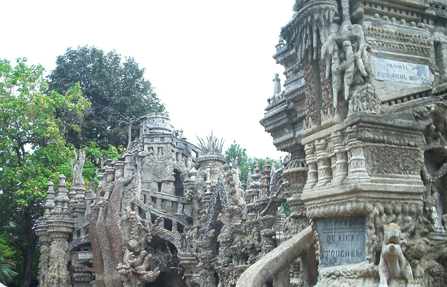 Palais idéal du Facteur Cheval - Vue globale de la façade Est. Hauterives, Drôme